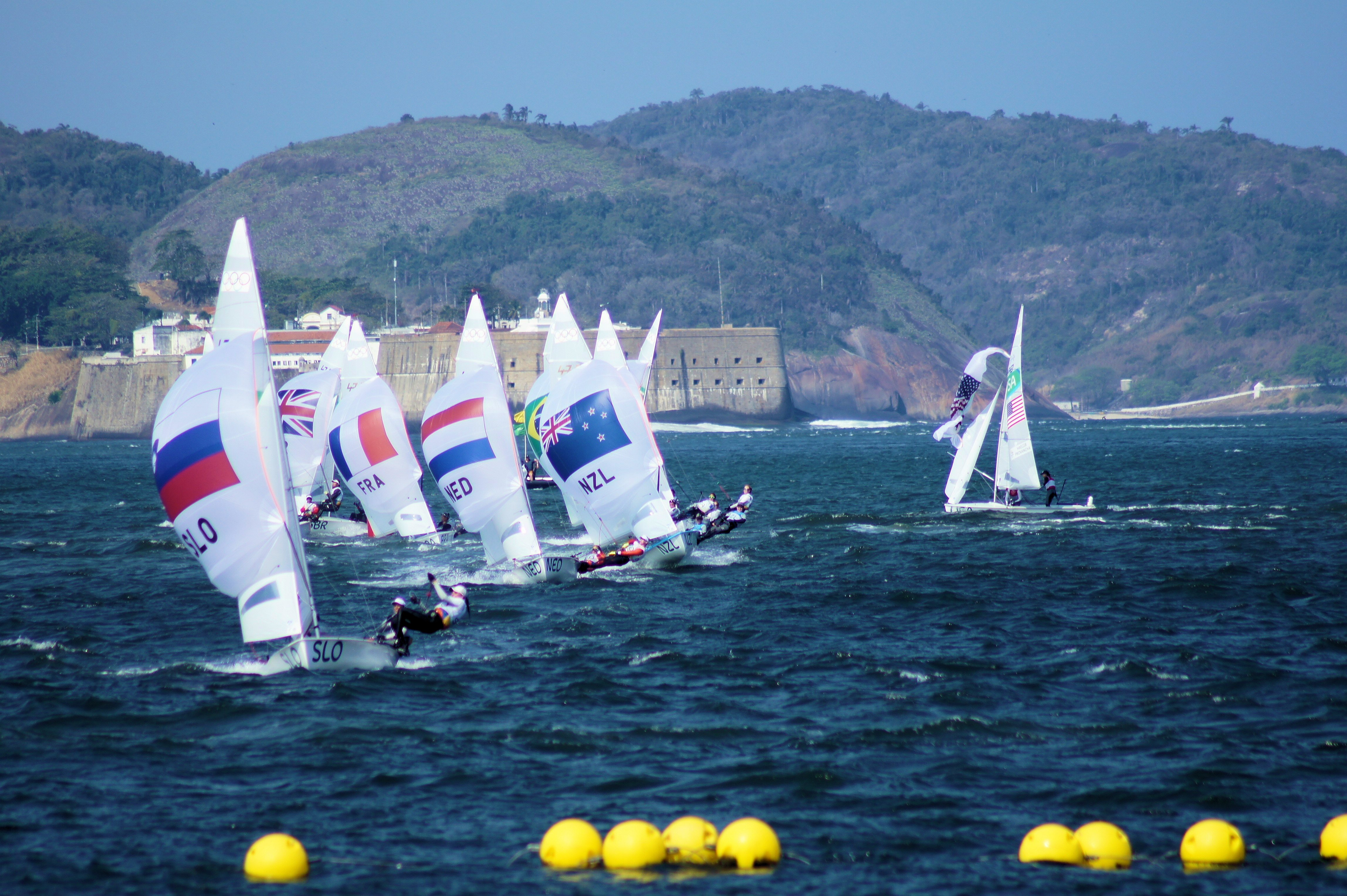 slt.a33